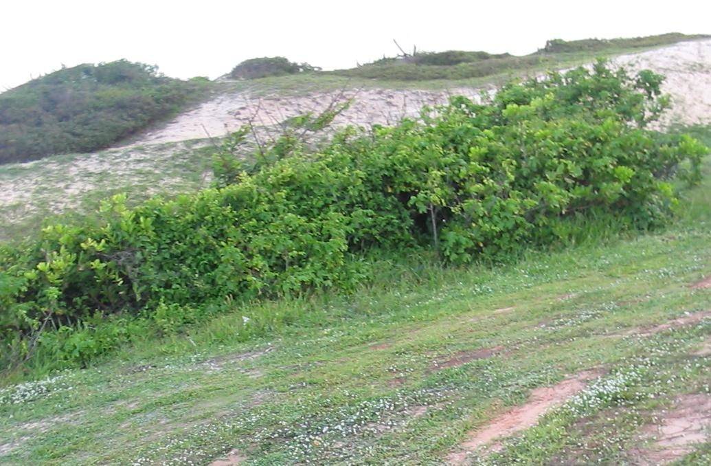 Imagem de vegetação de restinga. Exemplares da mata de Sabiaguaba em Fortaleza - Brasil